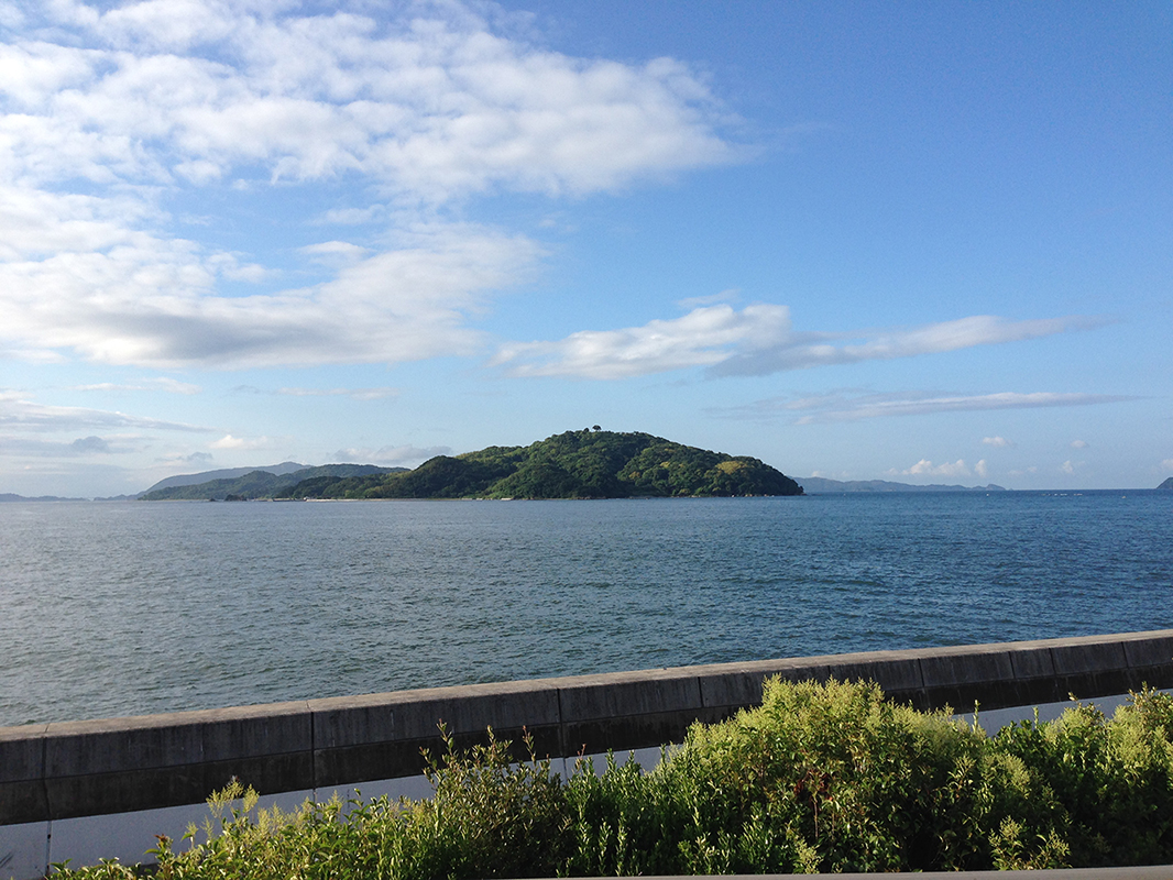 UMASHIMA